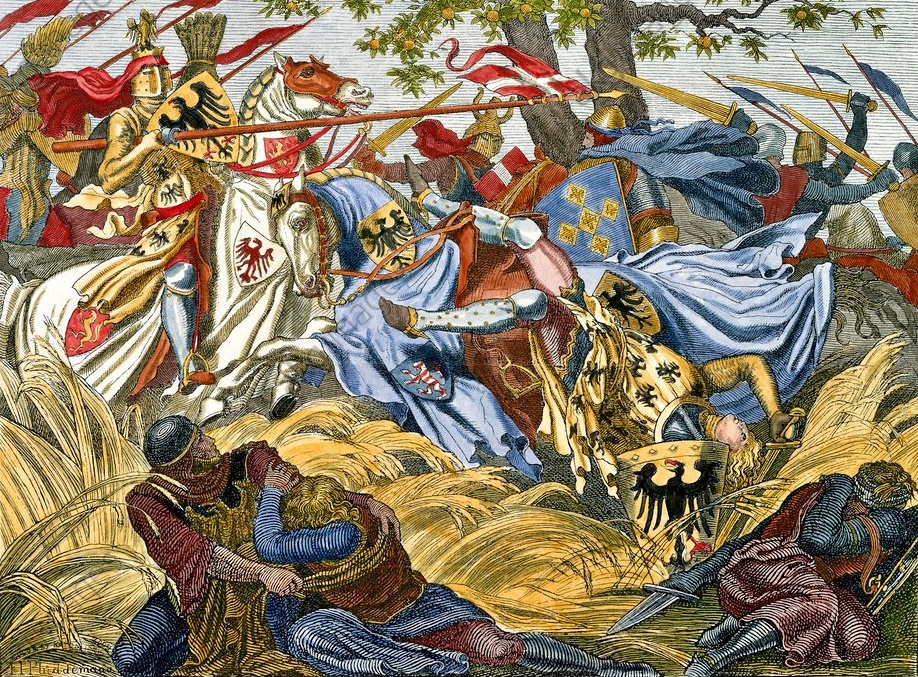 Tod König Adolfs von Nassau (durch Albrecht I. von Österreich) in der Schlacht bei Göllheim, 1298